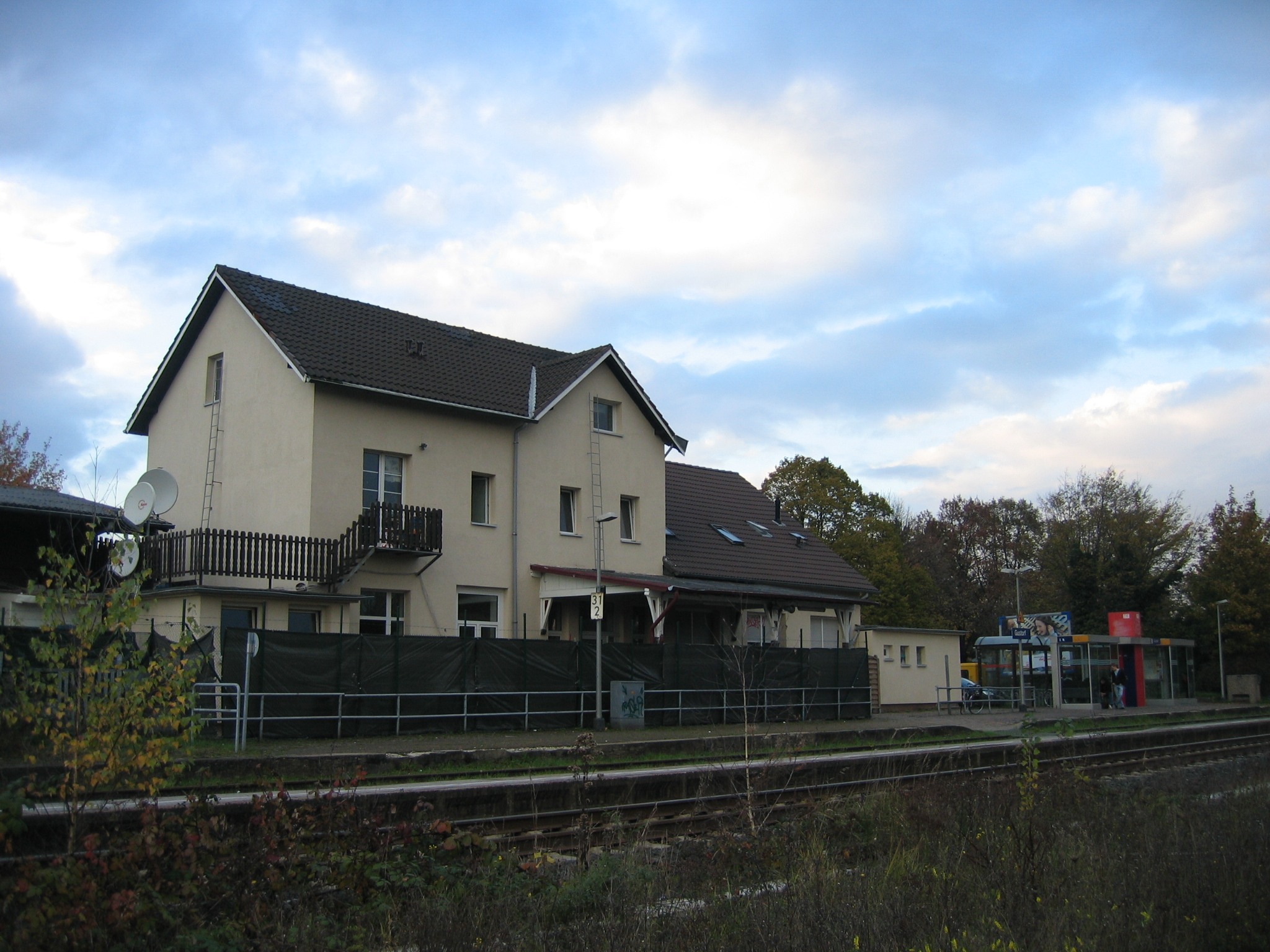 Bahnhof Gustorf an der Erftstrecke.